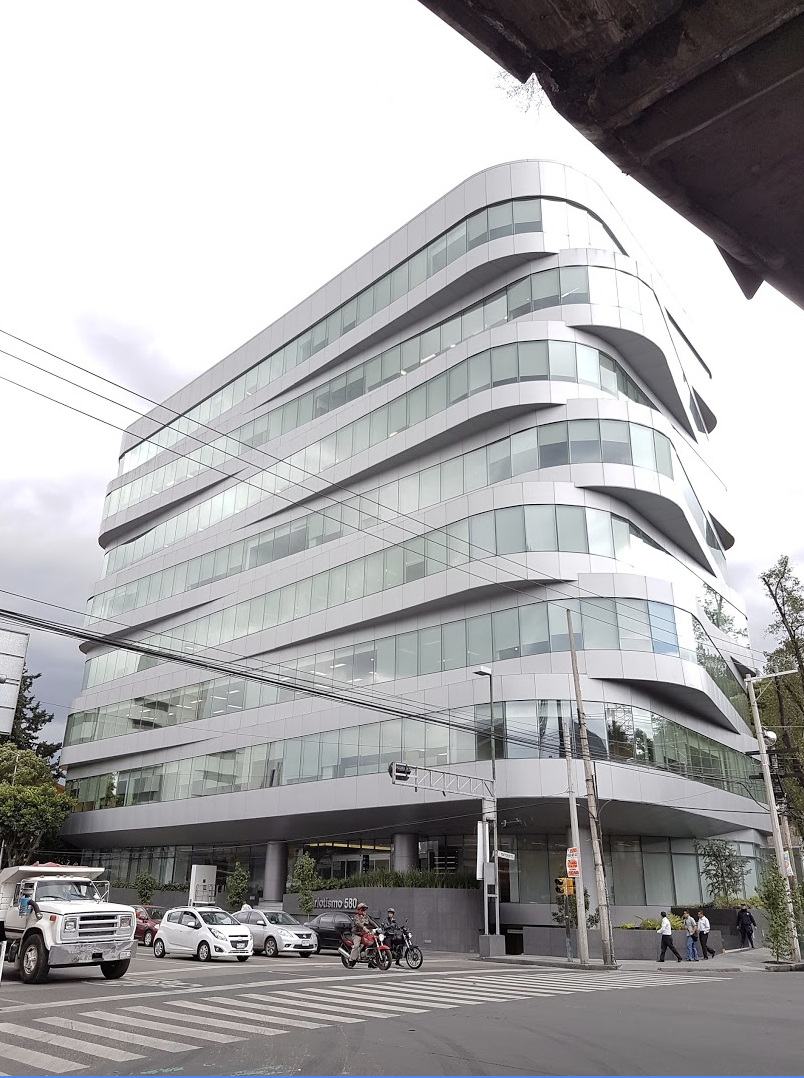 Oficinas CNH, Ciudad de México